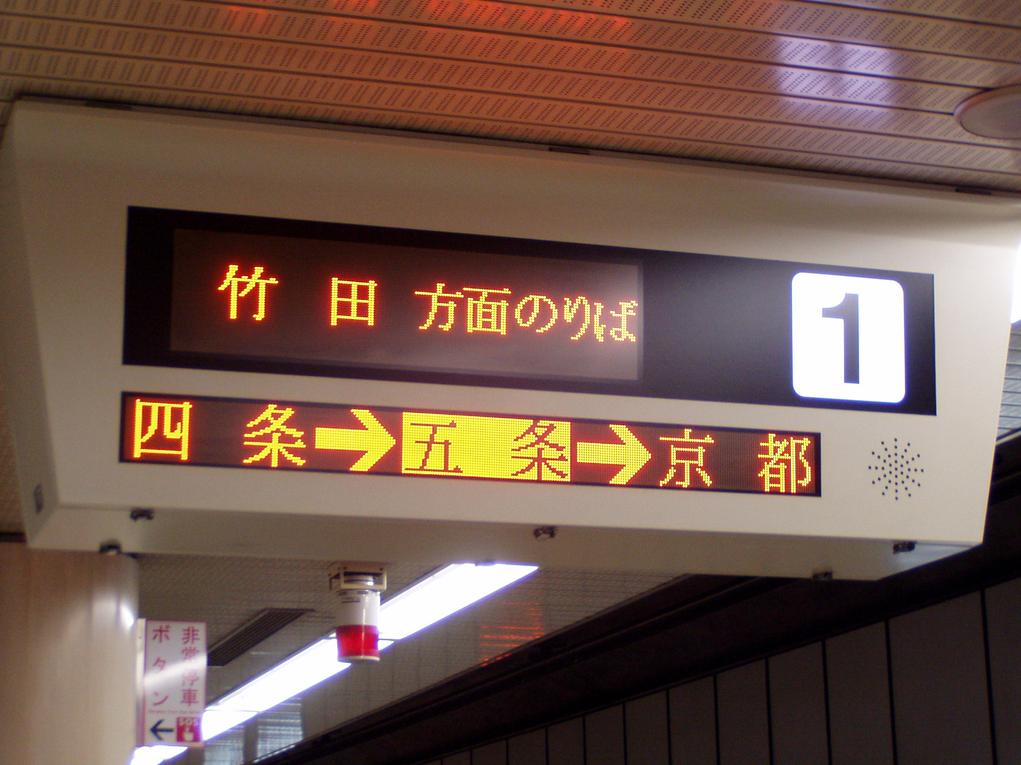 Kyoto. Metro station "next train" indicator.